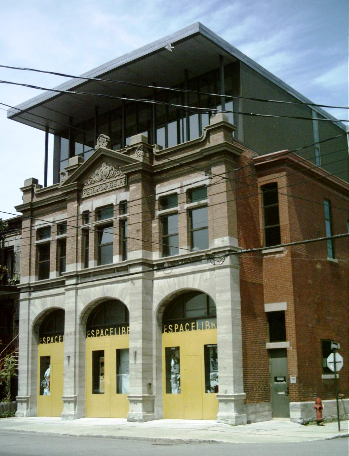 Le Théâtre Espace Libre est une salle de spectacle située au 1945 rue Fullum à Montréal.